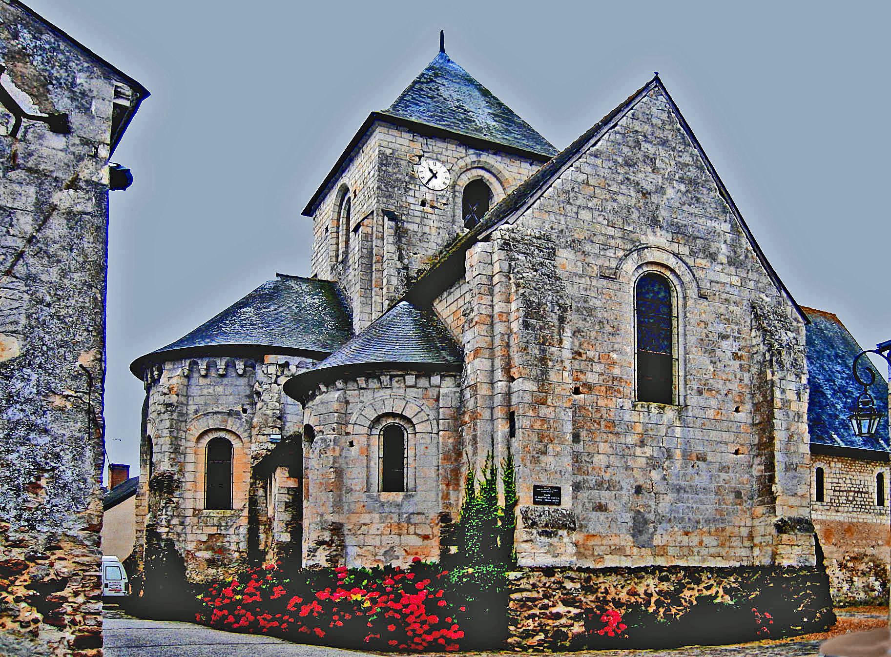 Église Saint-Martin-de-Vertou de Bocé, vue Nord-est.